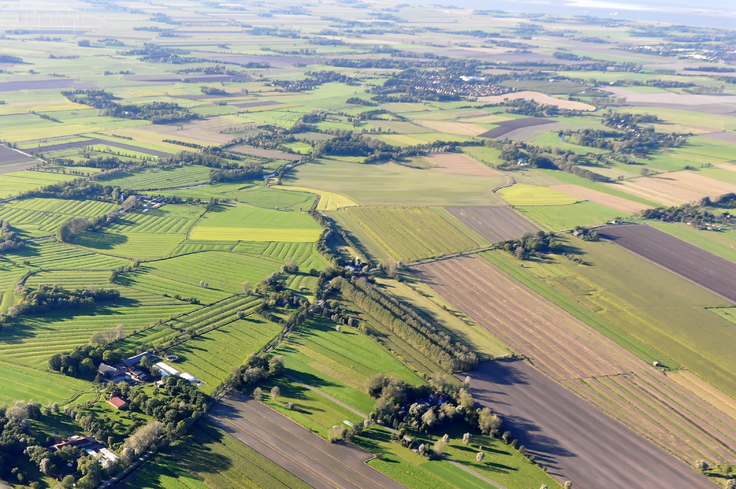 Luftaufnahmen Nordseekueste 2013-09